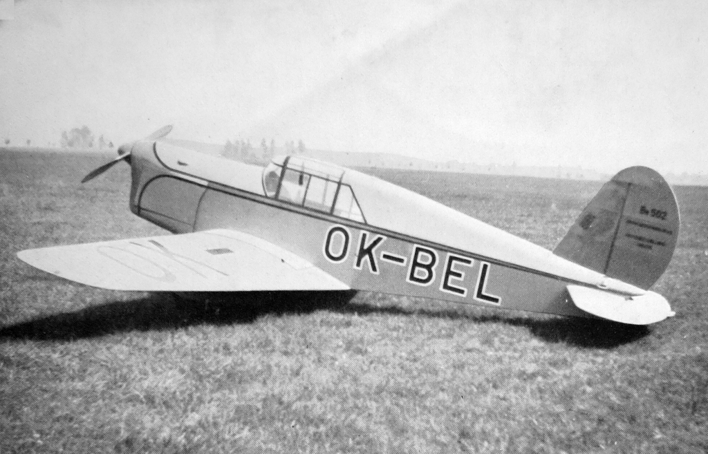 letecký motor Walter Minor 4 a letoun Be-502 Bibi (1936)